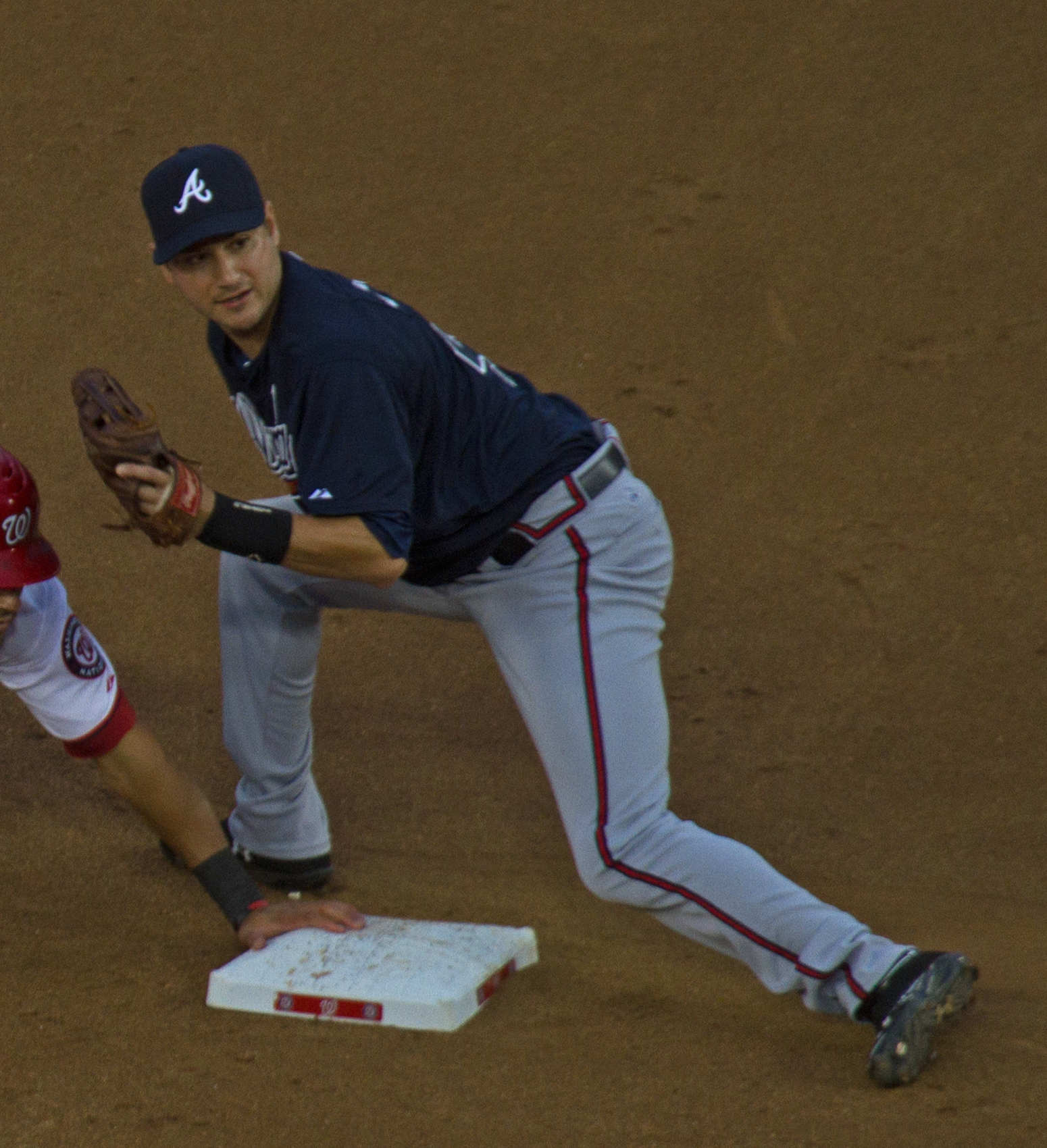 Paul Janish